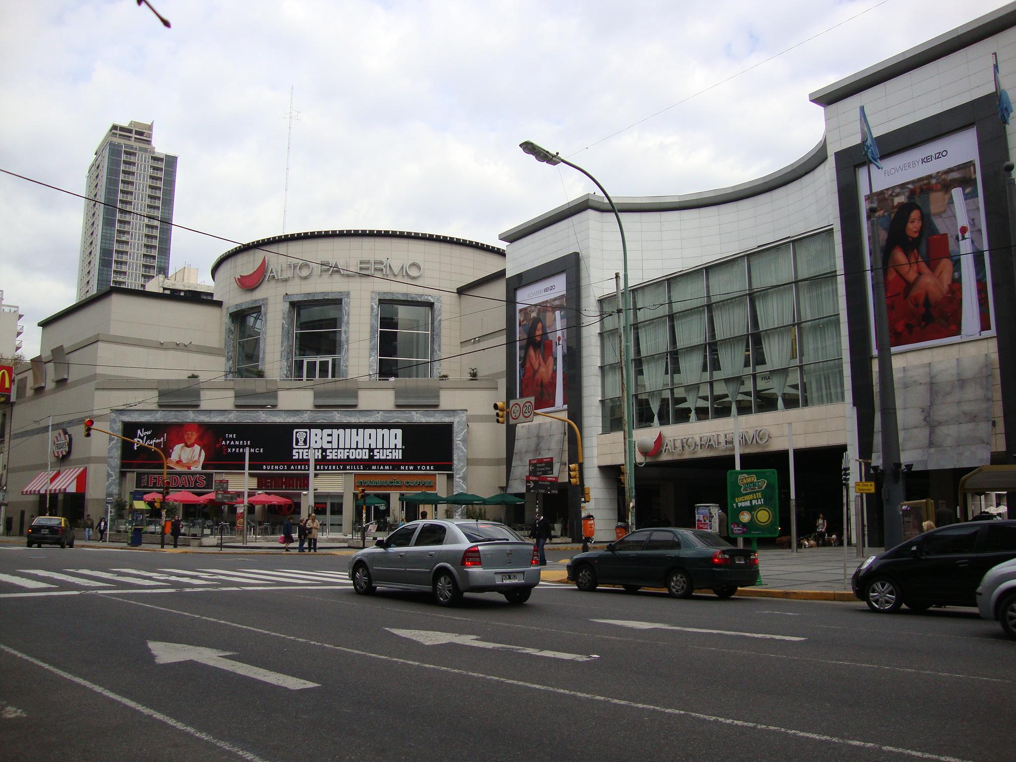 Shopping Alto Palermo, visto desde la Avenida Coronel Díaz entre Beruti y Arenales. Se ven el sector del patio de comidas y el paso de la calle Arenales bajo la estructura del centro comercial. Buenos Aires, Argentina.